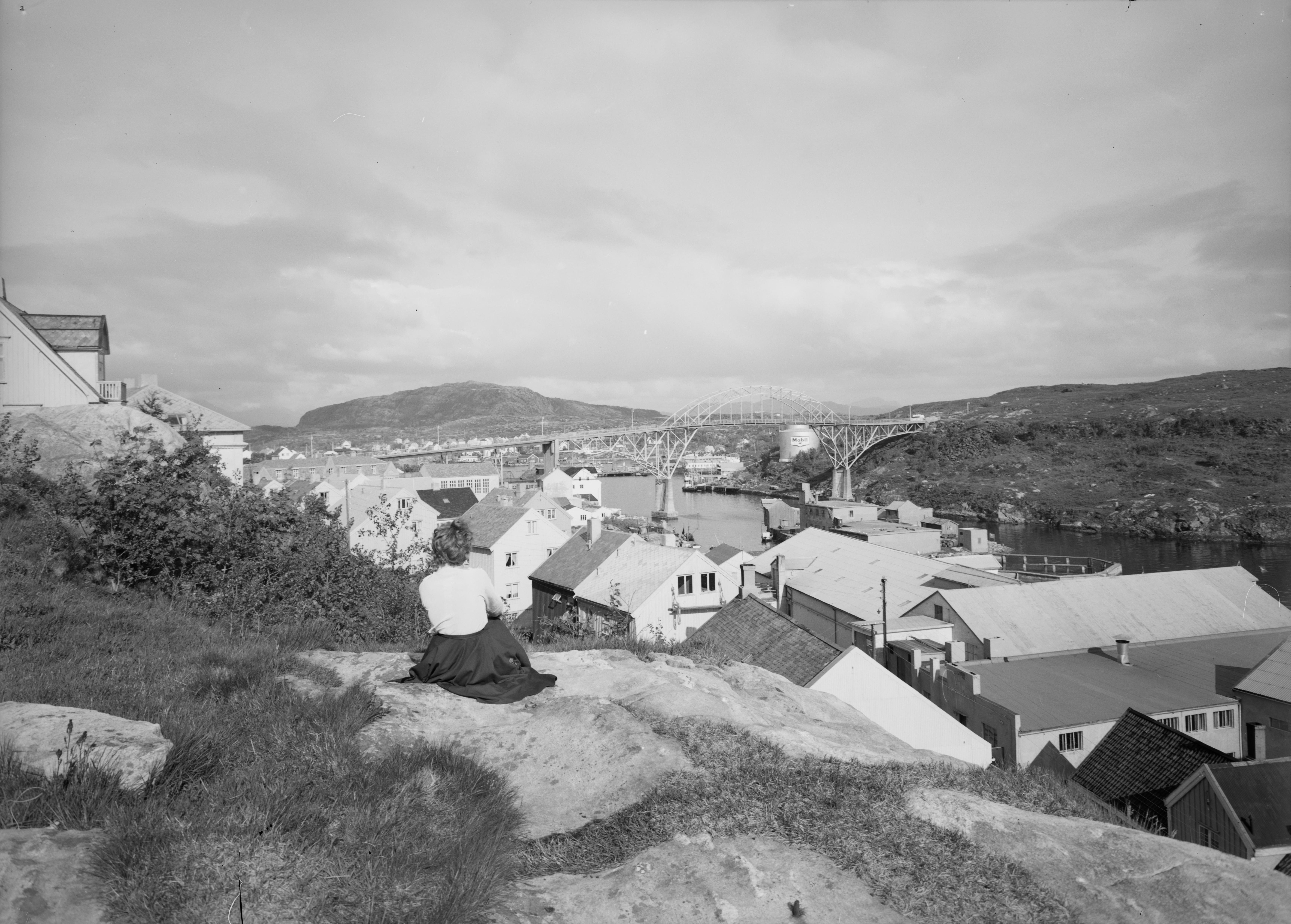 Bildet er hentet fra Nasjonalbibliotekets bildesamling. Anmerkninger til bildet var: Fotograf: E-KQ Kristiansund,Nordsundet, Kristiansund, Møre og Romsdal